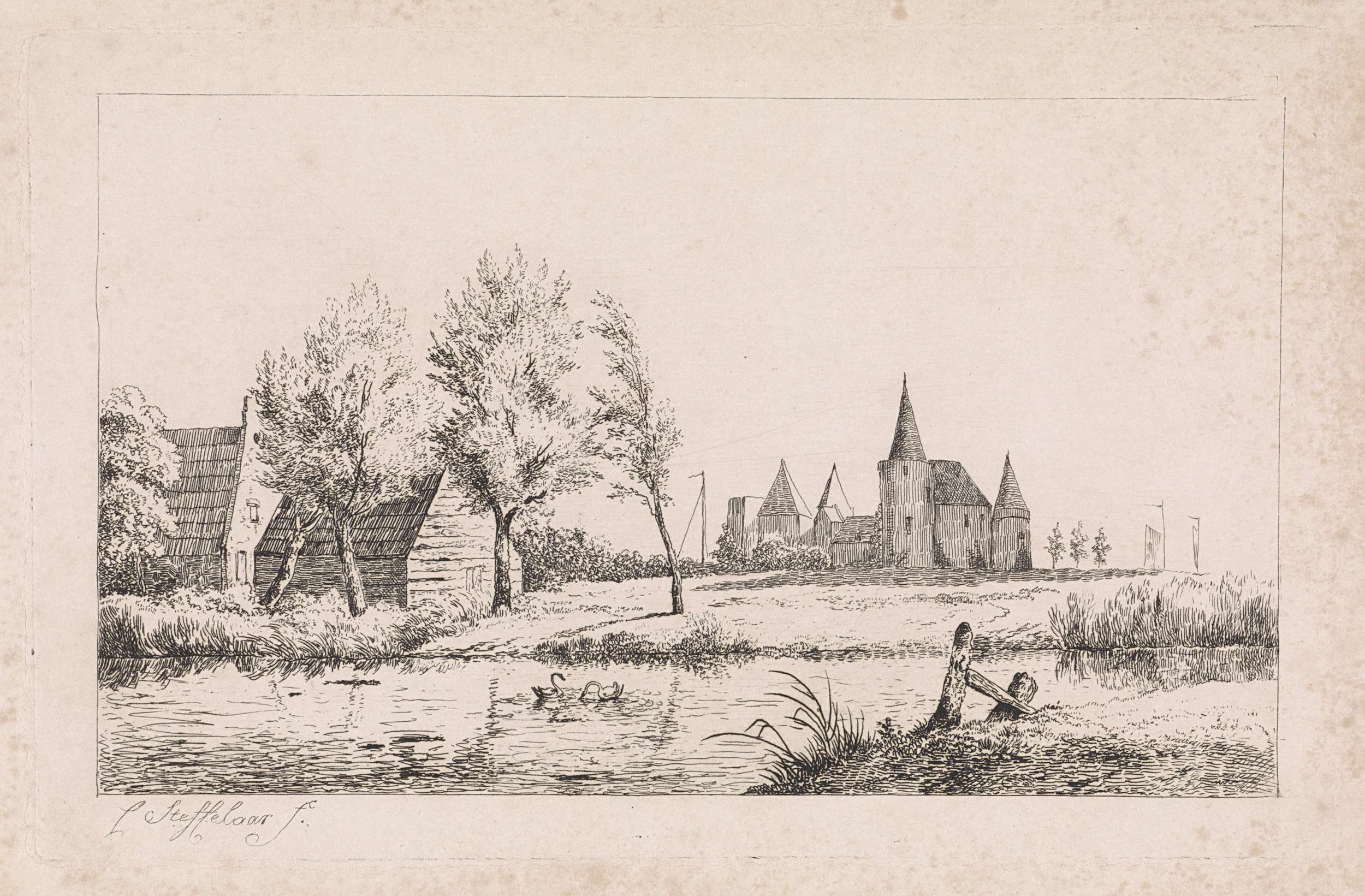 Landschap met op de voorgrond zwanen op het water. Op de achtergrond een kasteel.; Iconclasscode: 25F36(SWAN); Iconclasscode: 41A12; print